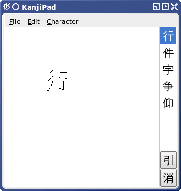 screenshot of gjiten/KanjiPad